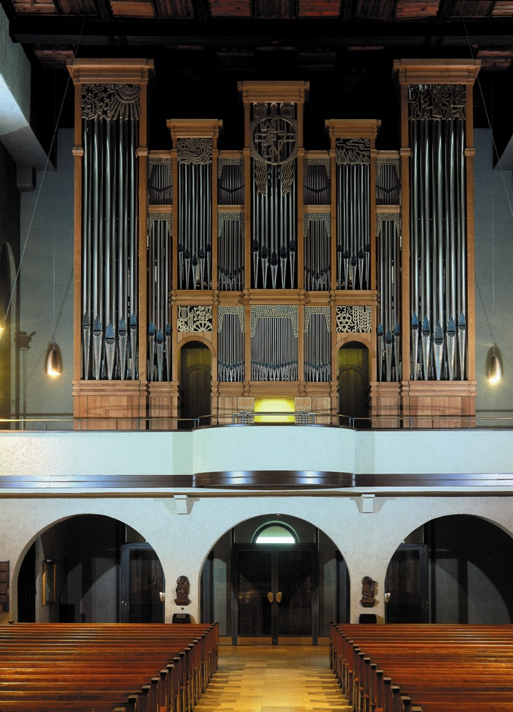 Ansicht der Vleugels-Orgel in der Herz-Jesu-Kirche in Aschaffenburg